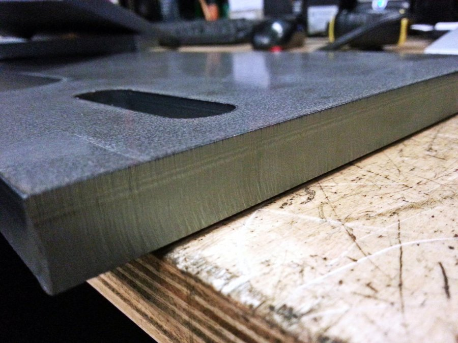 Schnittqualität in 12mm dickem Stahlblech mit 4KW Laserleistung. Geschnitten im Brennschneideverfahren mit Sauerstoff.